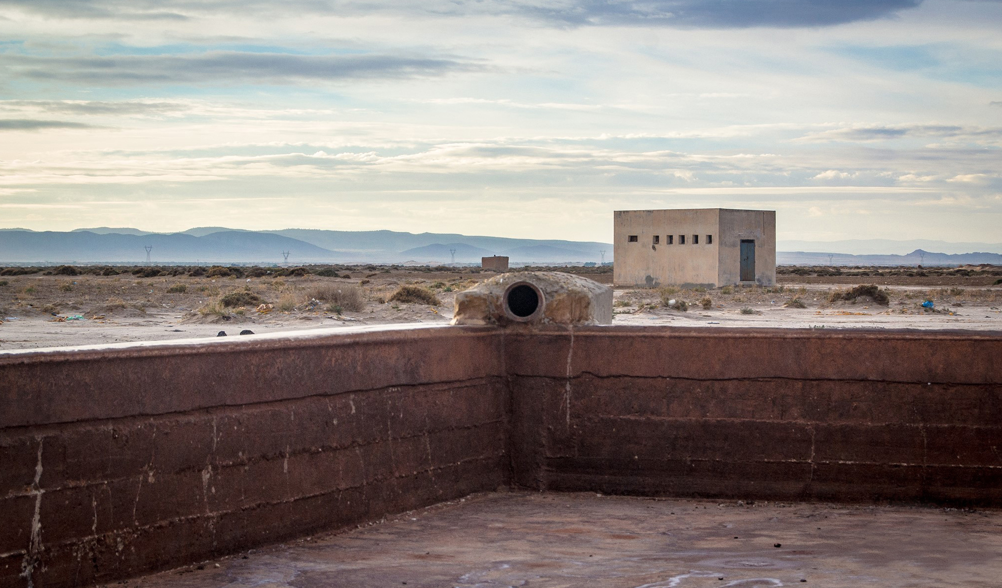 حمام الصوندا ، الحمام المعدني تصوير حاسي بحبح فوتوغرافي